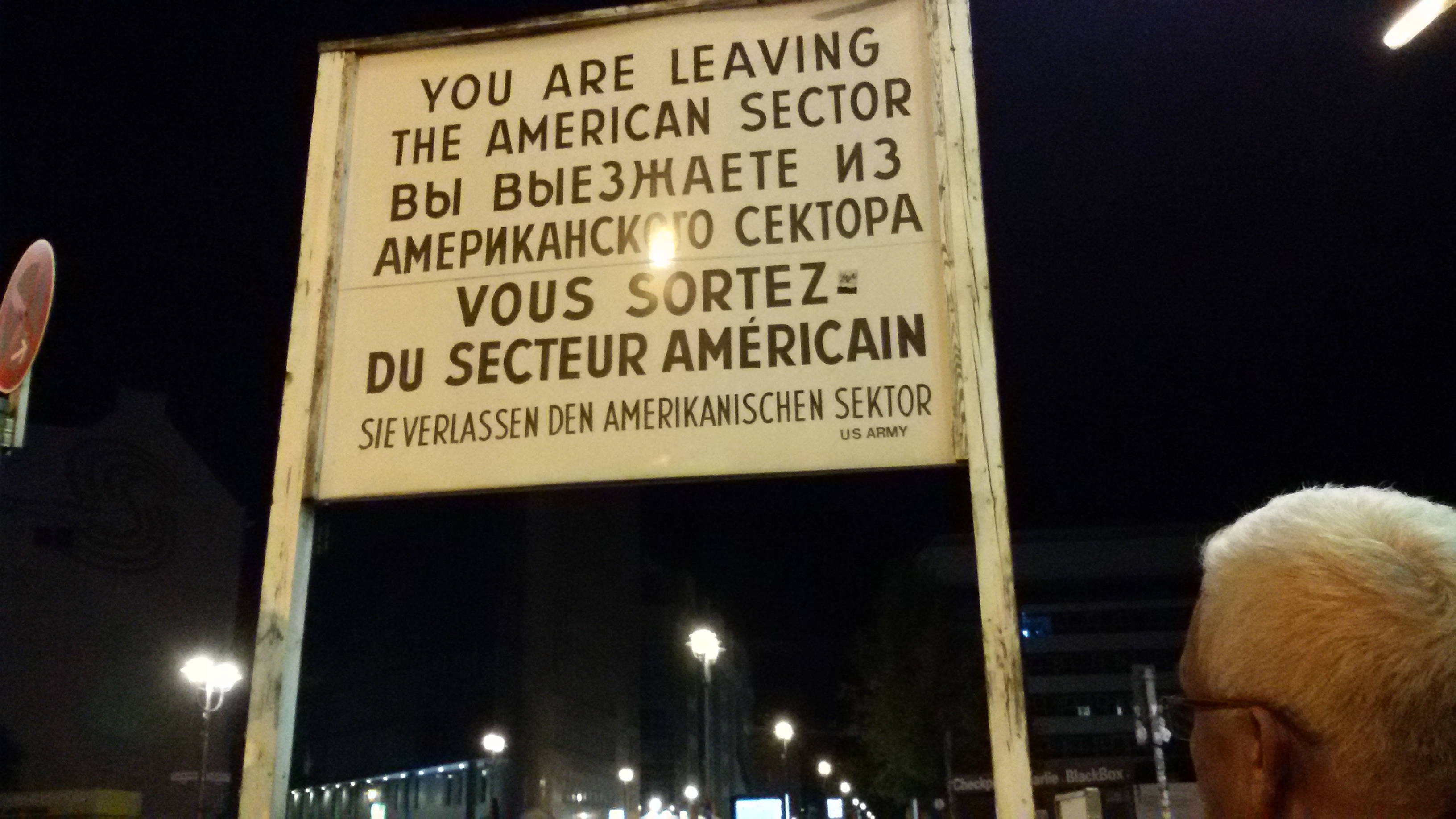 ചെക്പോയ്ന്റ് ചാർളി